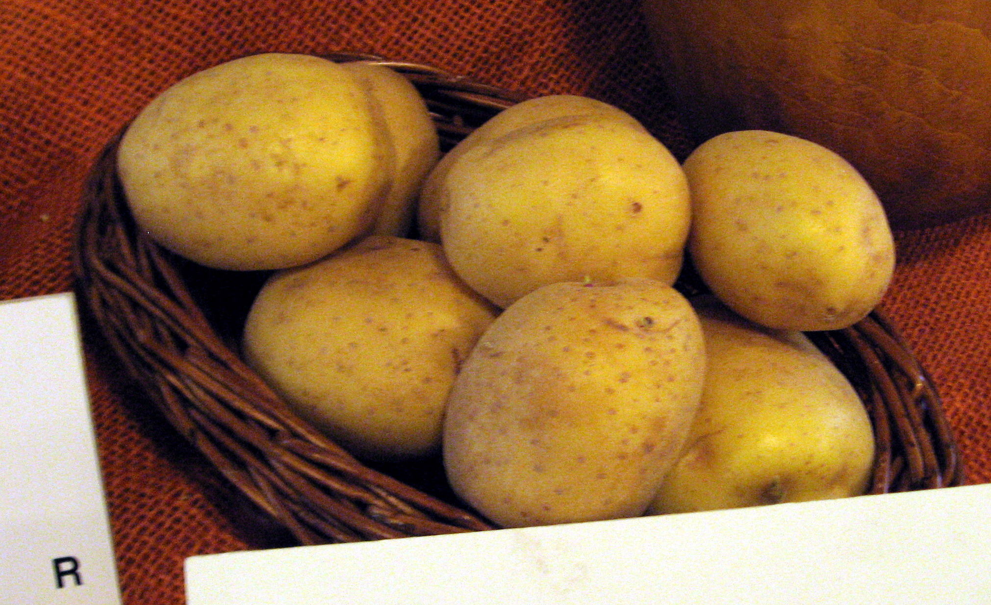 odrůda Marabel